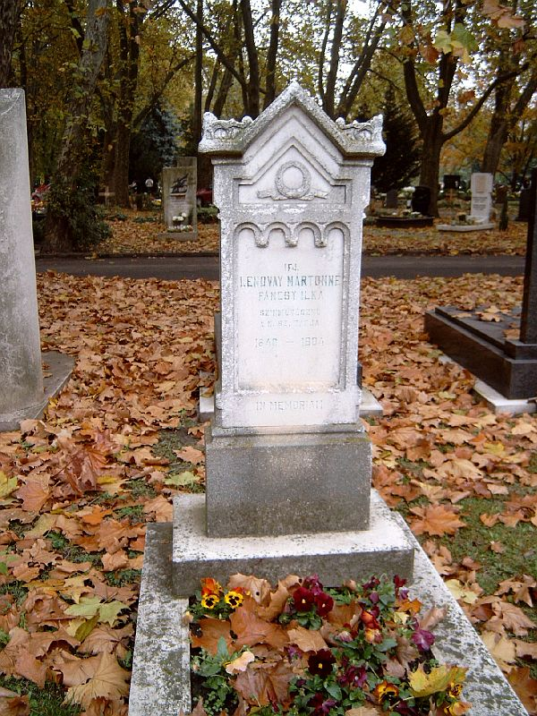 Fáncsy Ilka, ifj. Lendvay Mártonné (Pest, 1842. jan. 1. – Bp., 1904. nov. 22.): színésznő, a Nemzeti Színház második nemzedékének tagja, Fáncsy Lajos leányának sírja Budapesten. Kerepesi temető: 34/1-2-32.